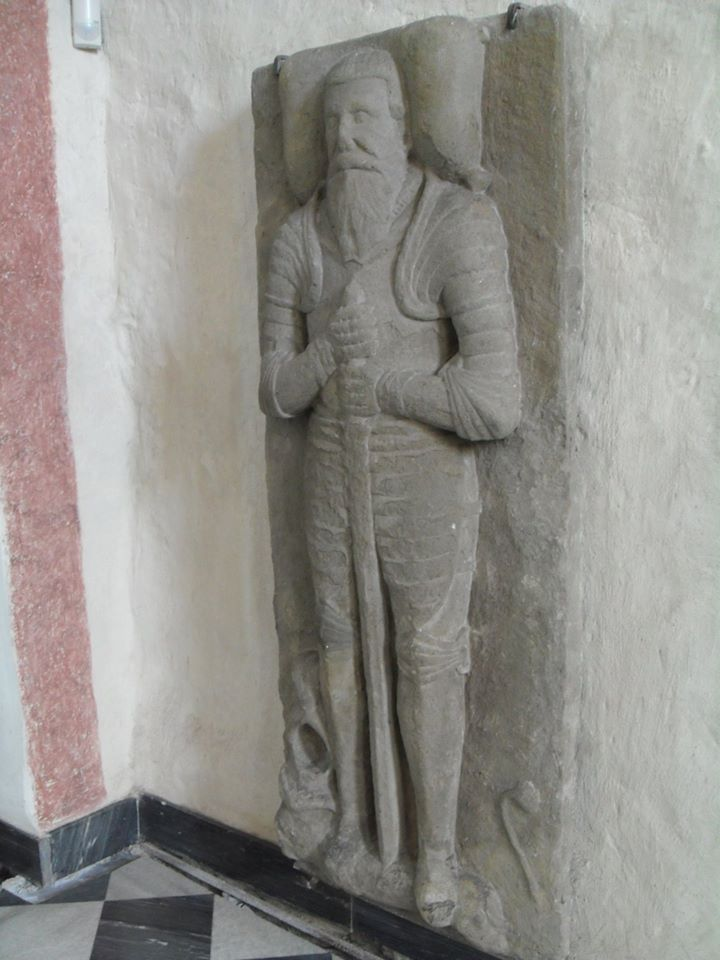 Náhrobek Václava Cigána ze Slupska, hraběte ve Fryštátě (je o nejstarší dochovaný náhrobek v české části Těšínska)